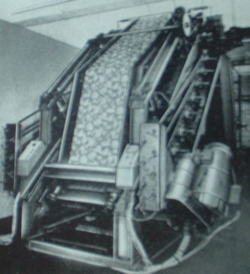 Walzendruckmaschine